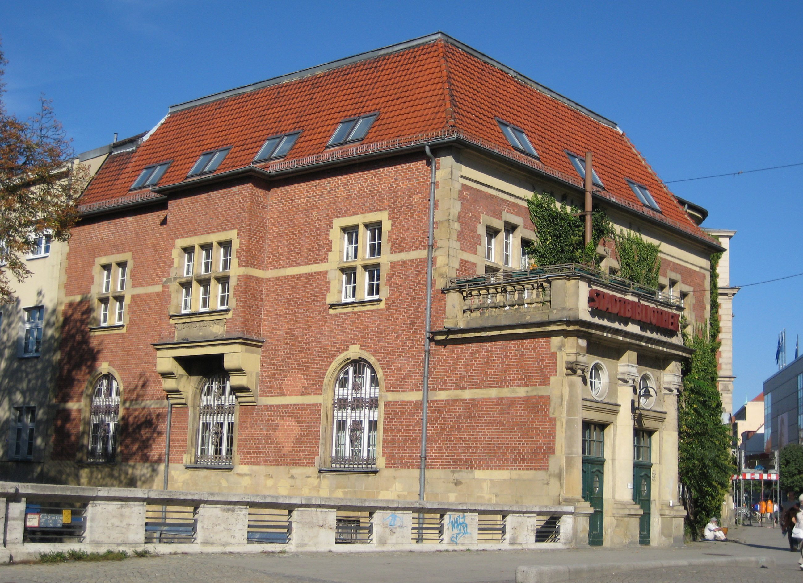 Stadtbibliothek Spandau Carl-Schurz-Straße 13